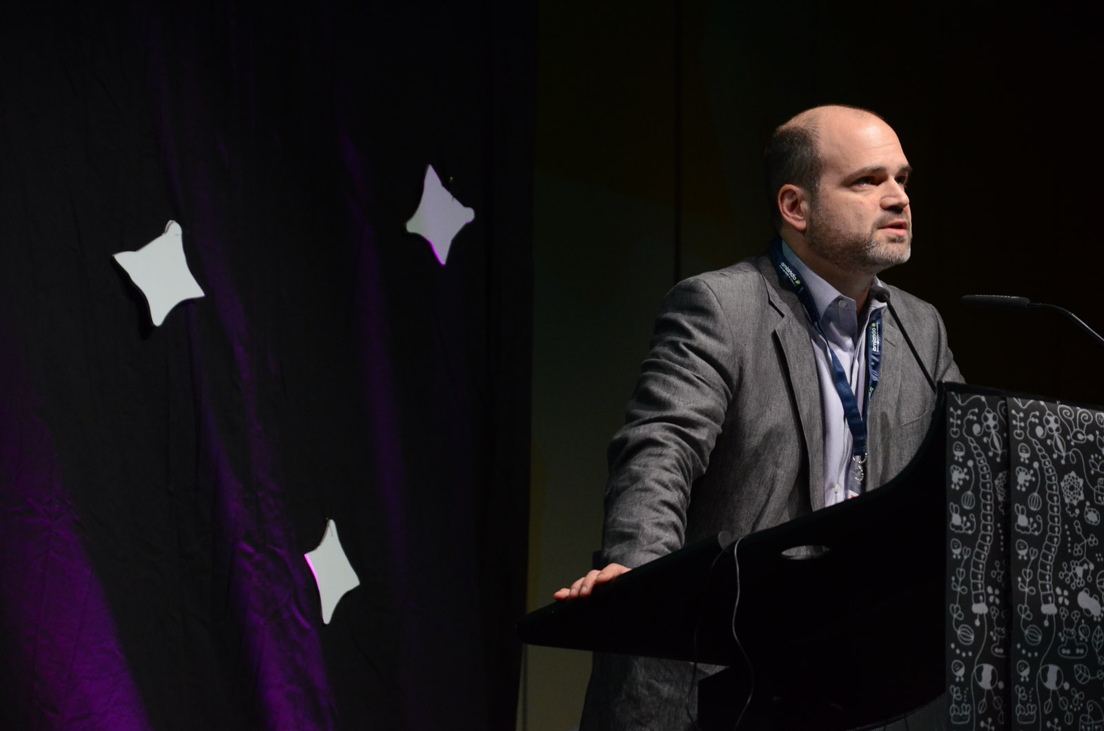 Sami Kanaan by Ivo Näpflin